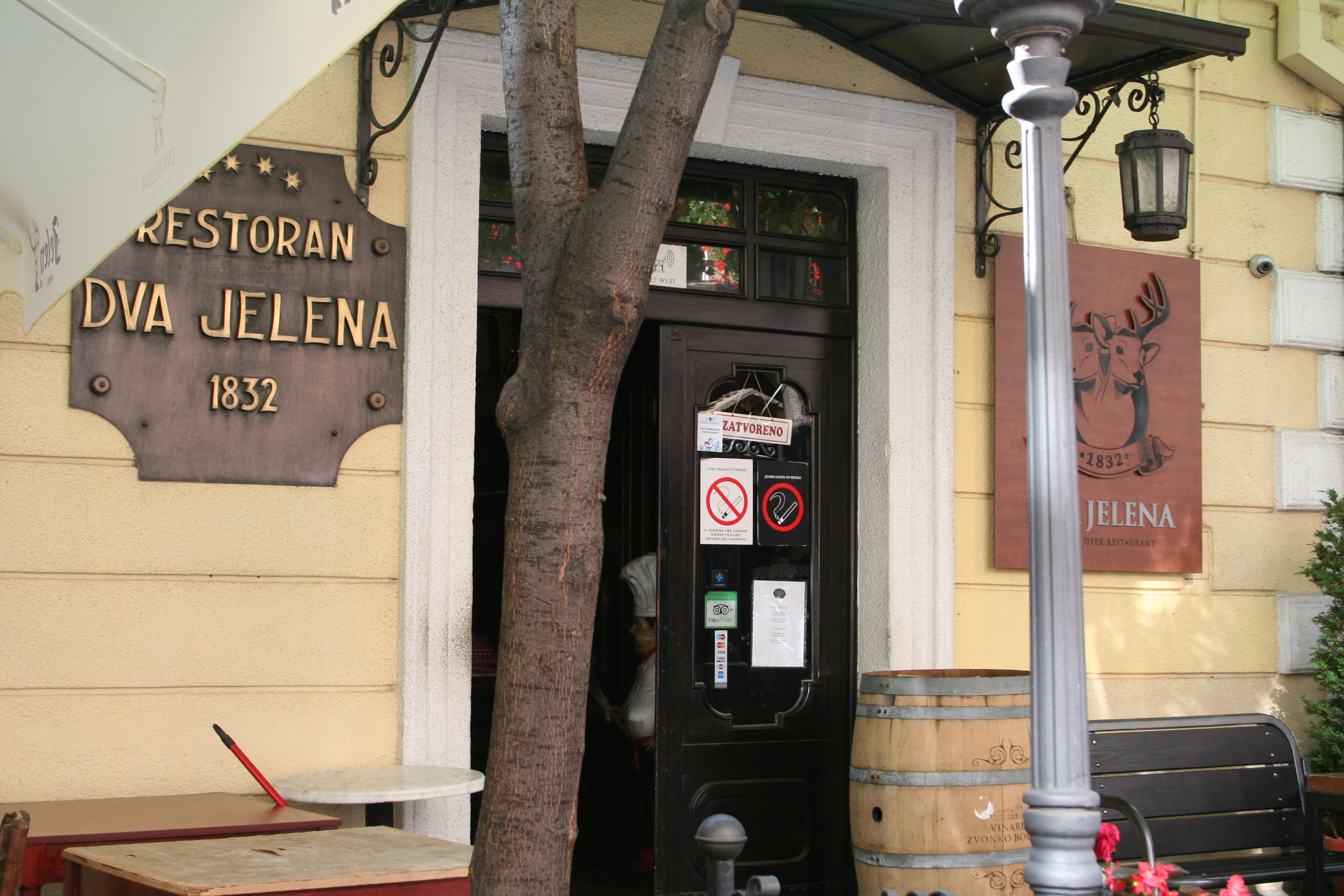 Skadarlijske kafane